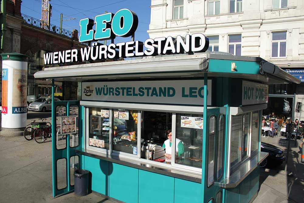 Würstelstand Leo im Herbst